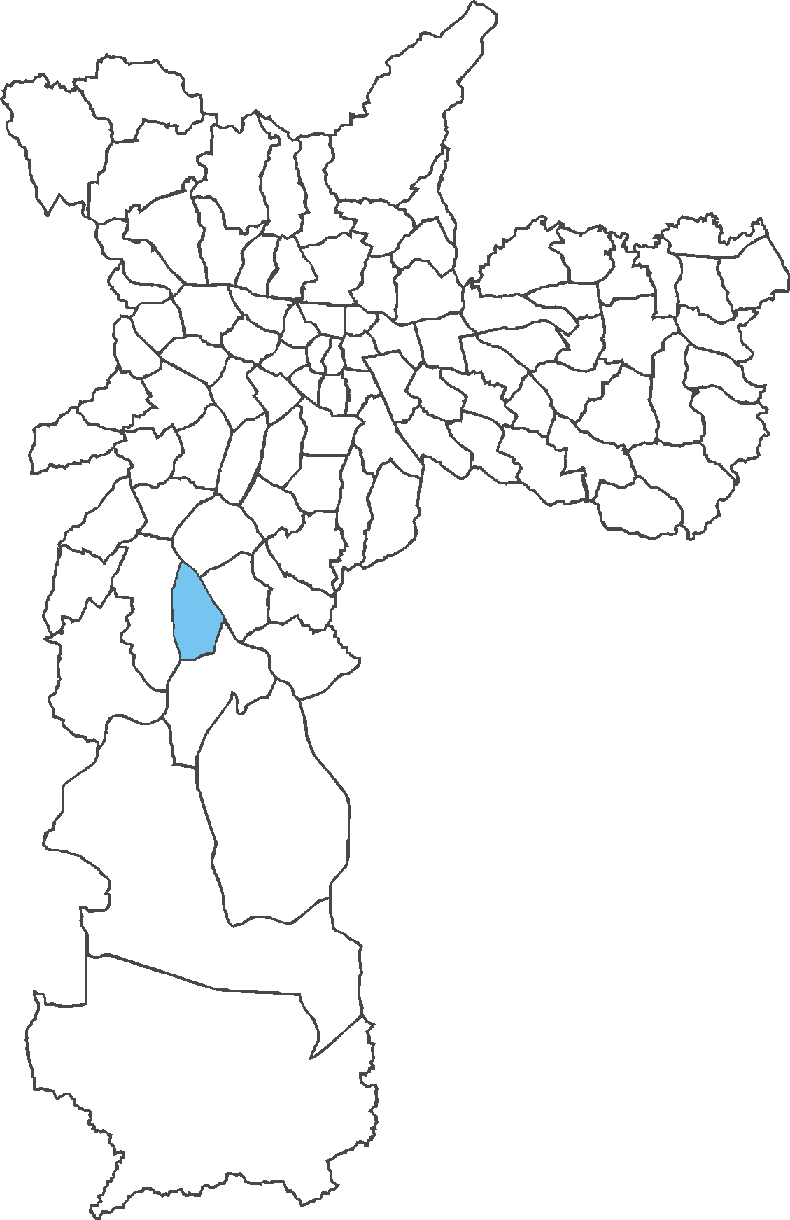 Localização do distrito de Socorro no município de São Paulo.